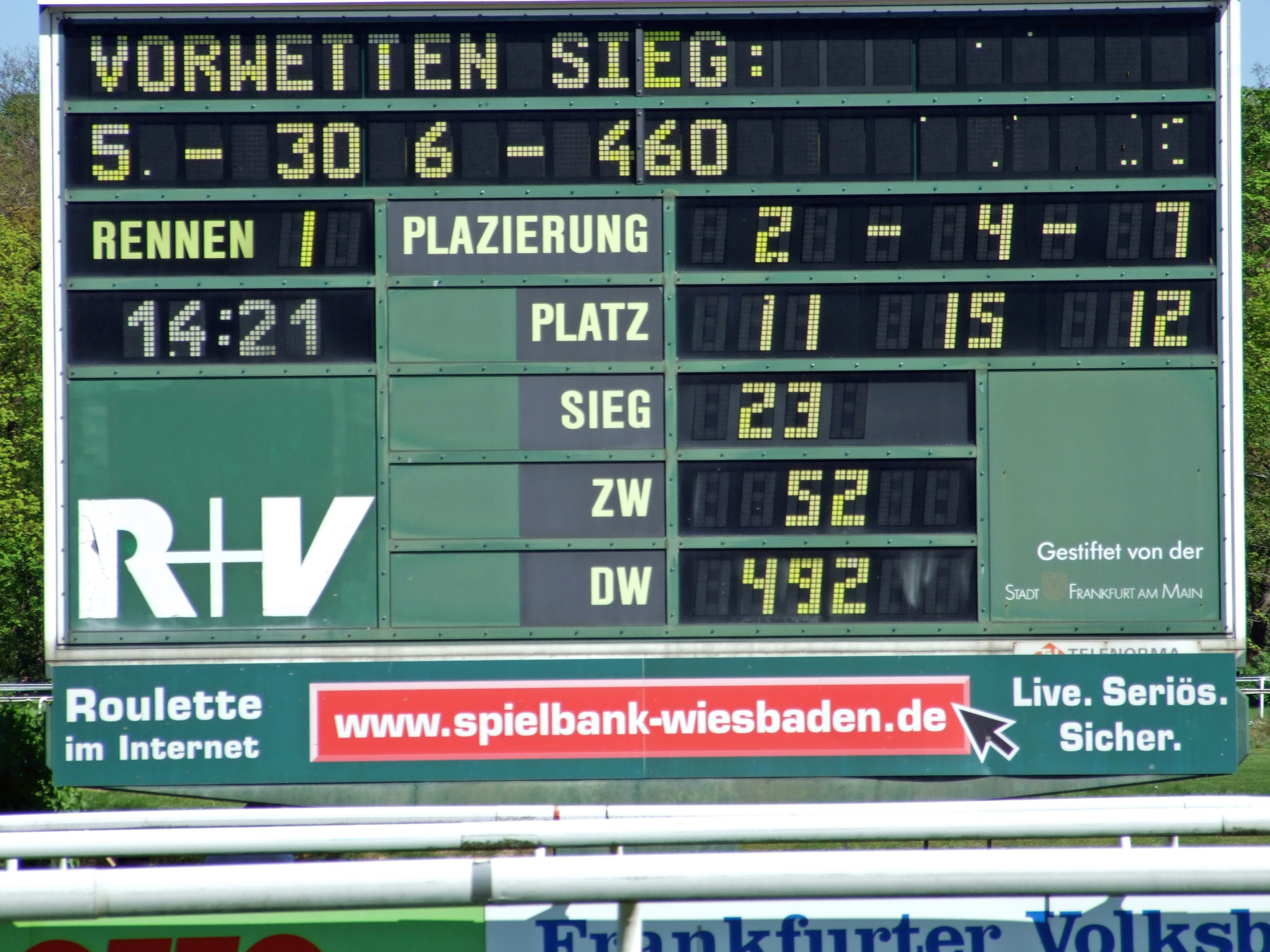 Anzeigetafel nach Beendigung des ersten Laufes und Feststellung der Platzierungen und Quoten in Frankfurt-Niederrad